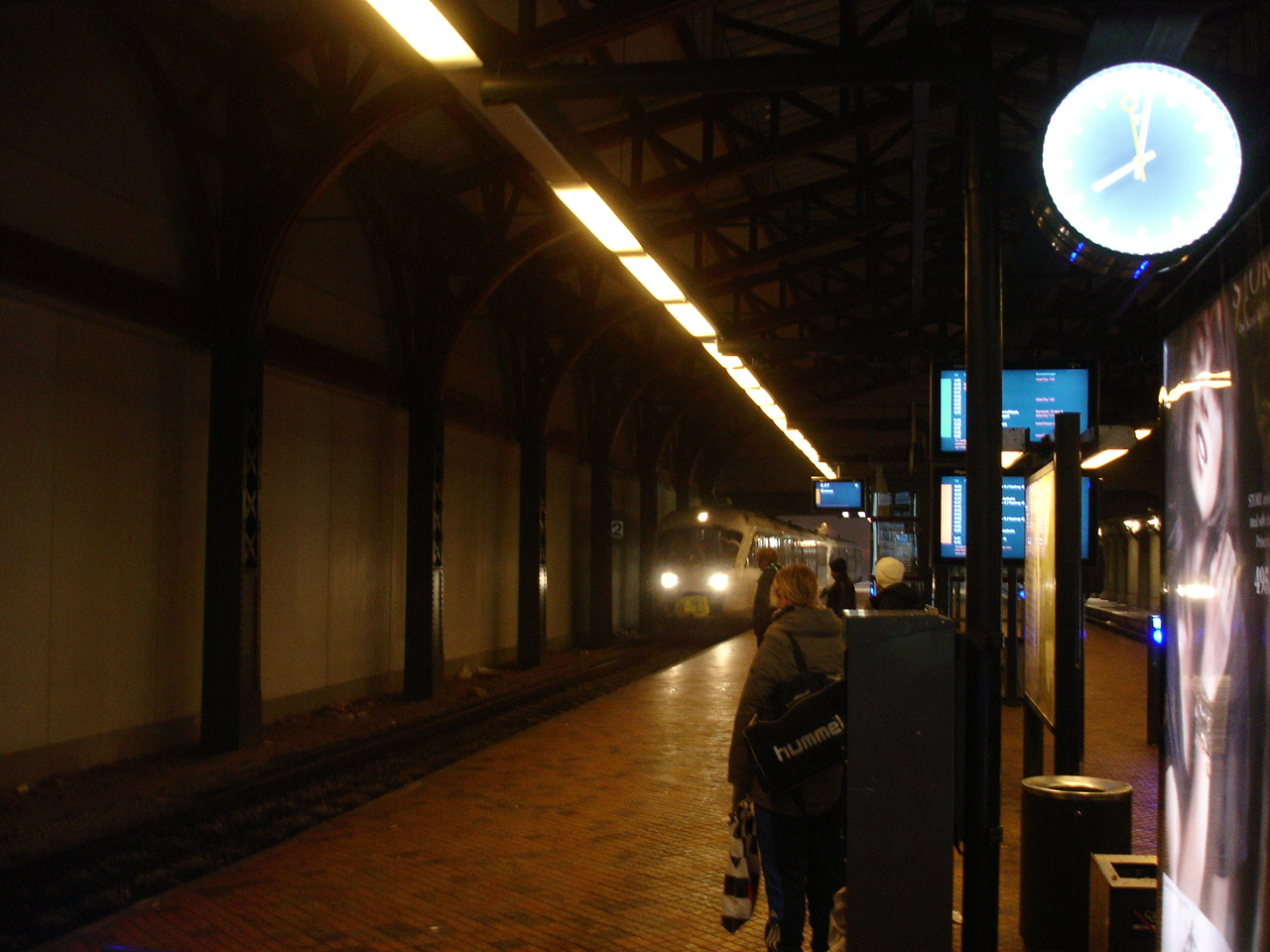 Nærbanens første plantog ankommer fra Odder til Aarhus H d. 9. december 2012 kl. 8.02